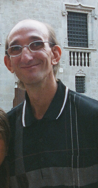 Benito Pocino en la Plaza del Rey de Barcelona